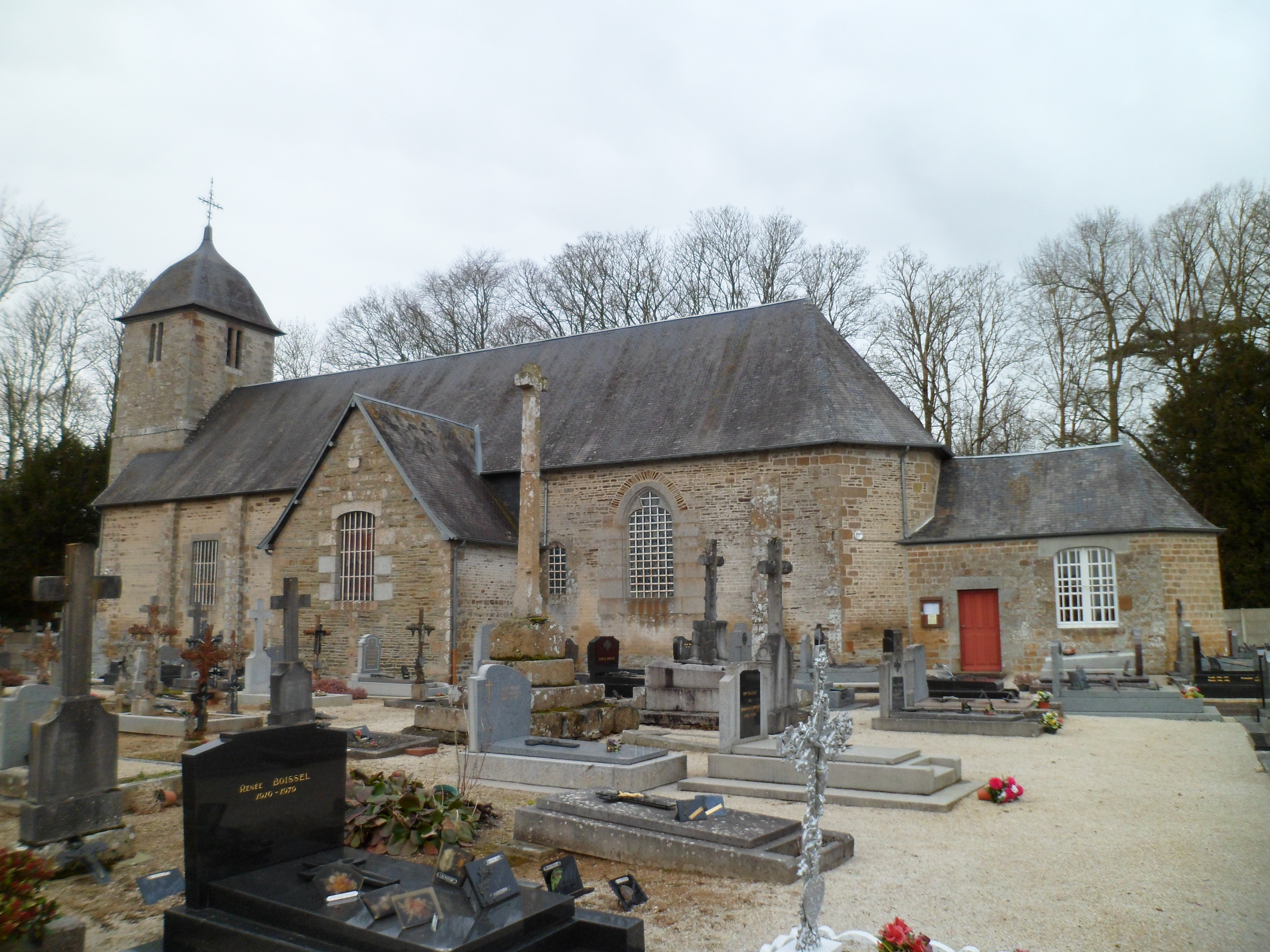 église Saint-Pierre de Milly